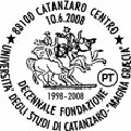 Timbro/annullo speciale in occasione del decennale unicz